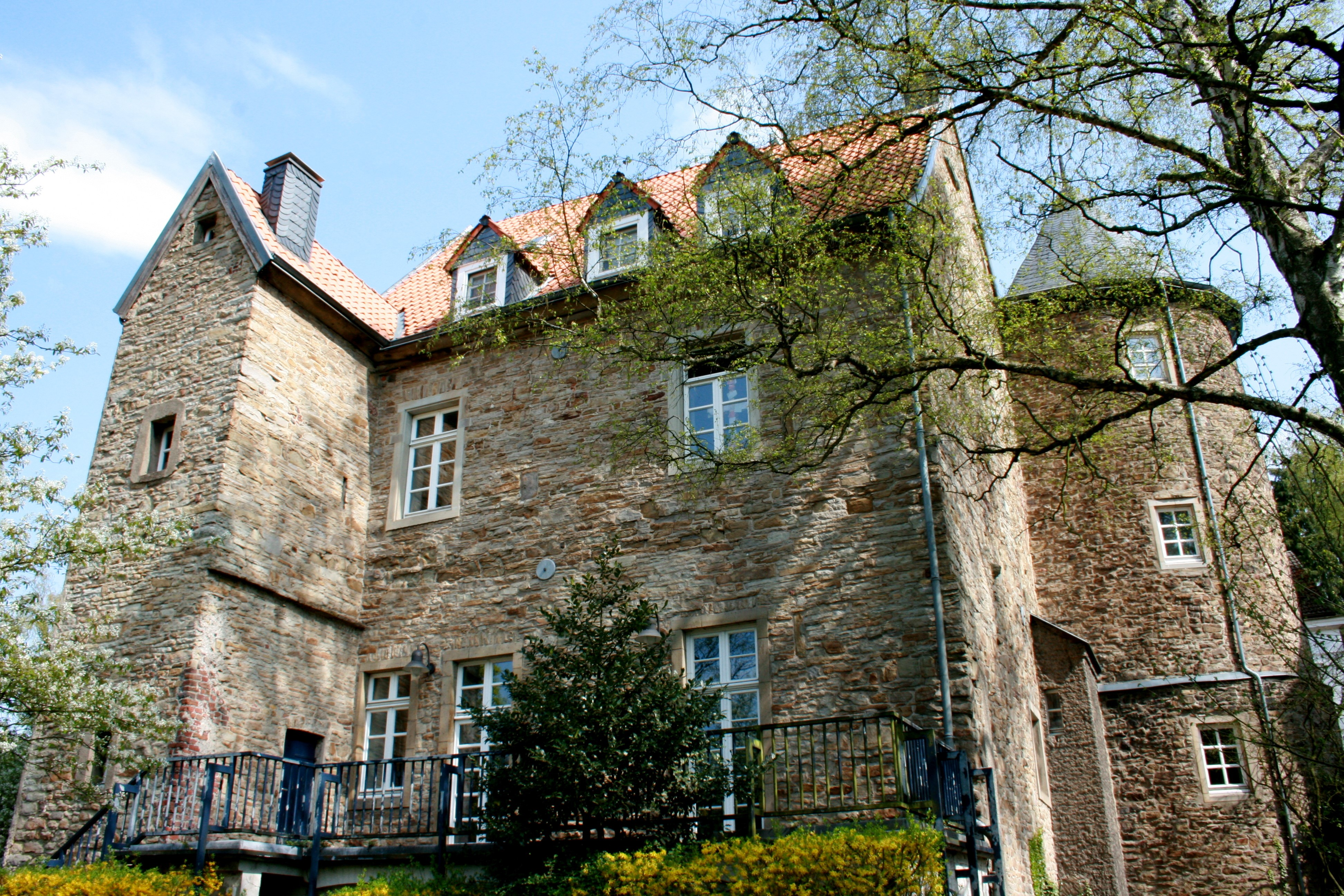 Haus Heck in der Heckstraße in Essen-Werden